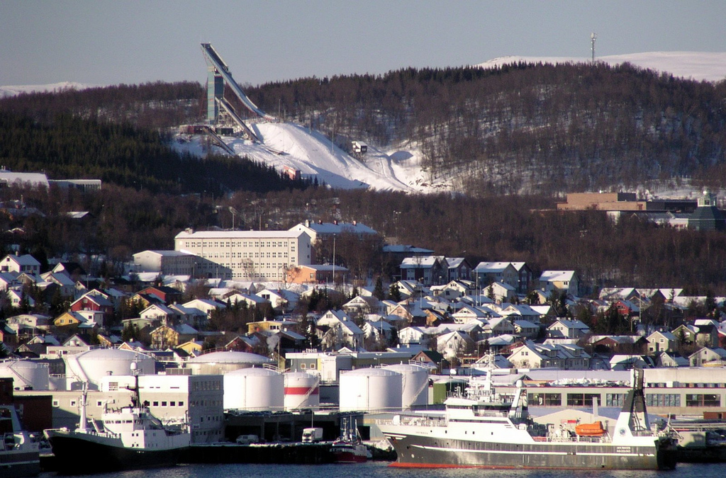 Gronnasen ski jumping hill